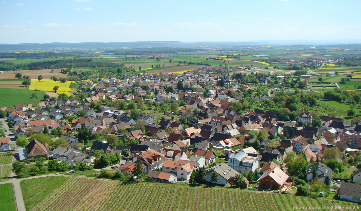 Blick von Burg Steinsberg über Sinsheim-Weiler